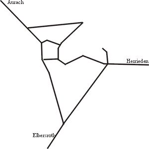 Basic line map of Stadel, Herrieden, Ansbach, Bayern, Deutschland